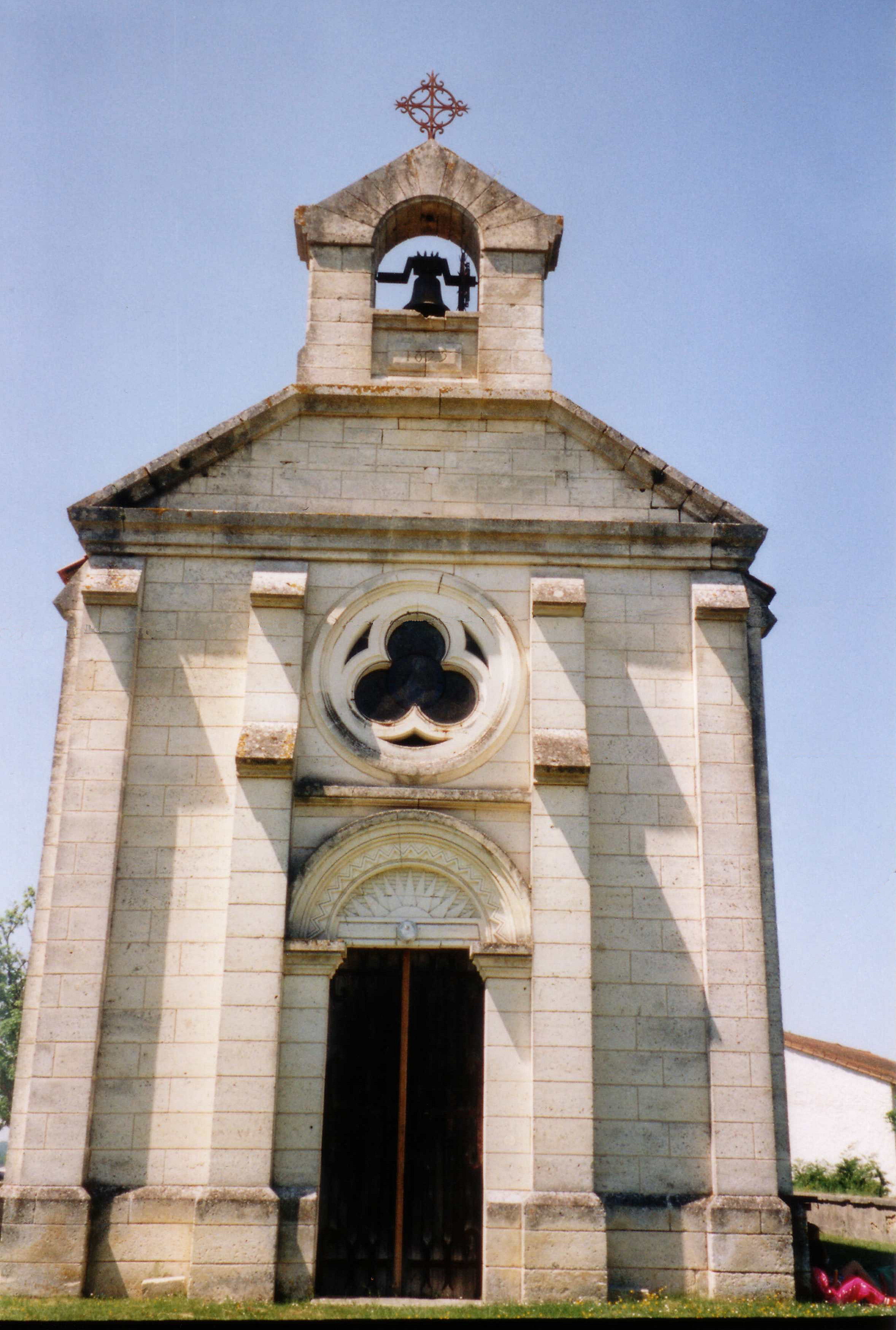 L'église dans le hameau Rudeau de la commune Rudeau-Ladosse, canton de Mareuil, Dordogne, France.